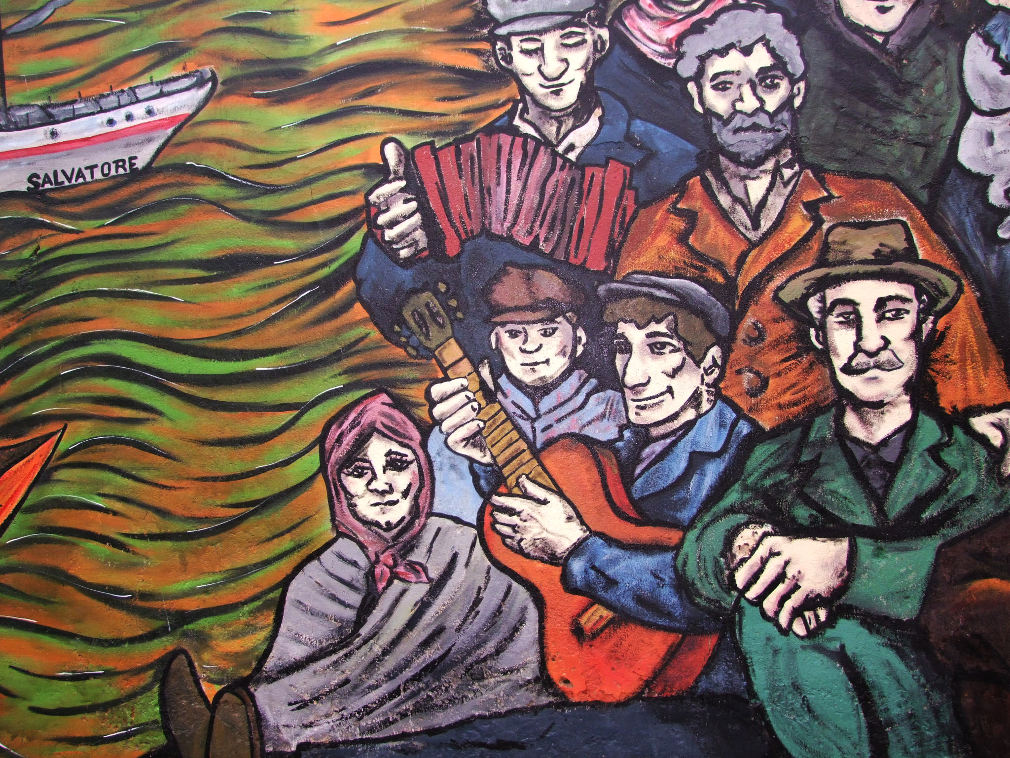 Inmigrantes 2